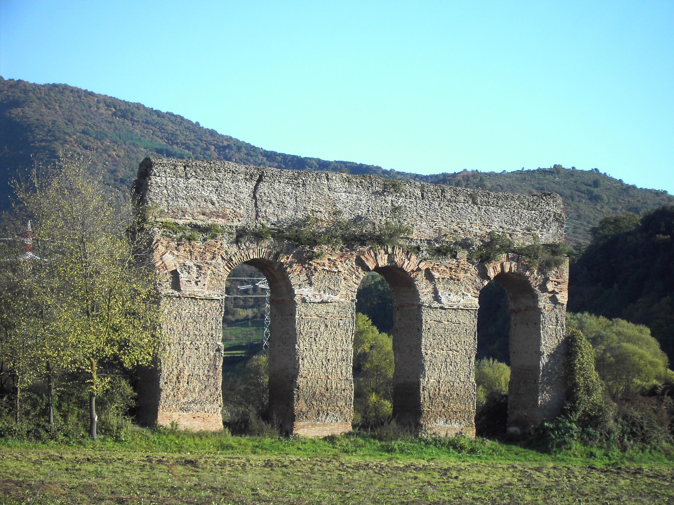 Tivoli, acquedotto agli Arci